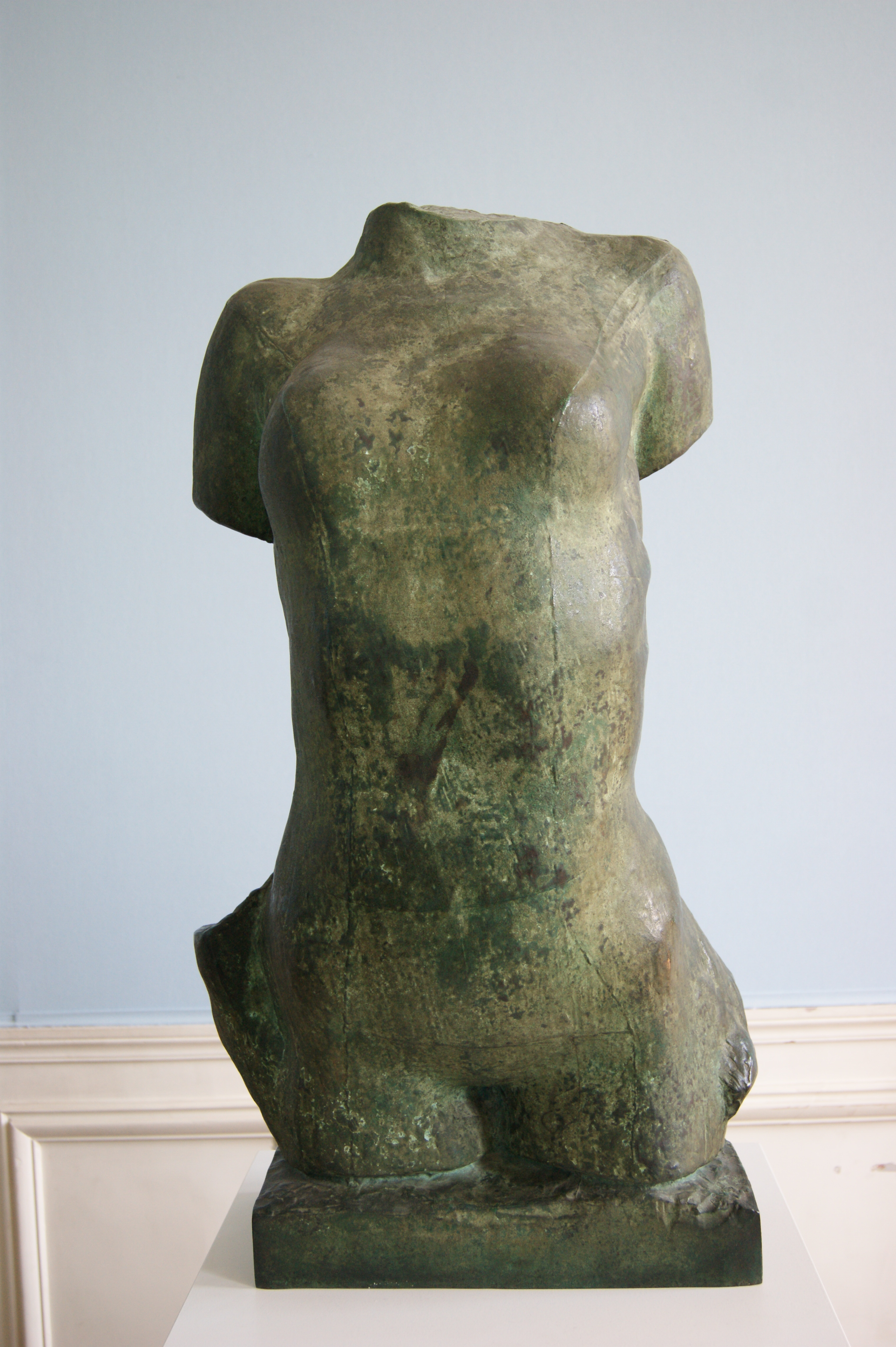 Musée Rodin - Torse de jeune femme cambrée - Bronze - 1909